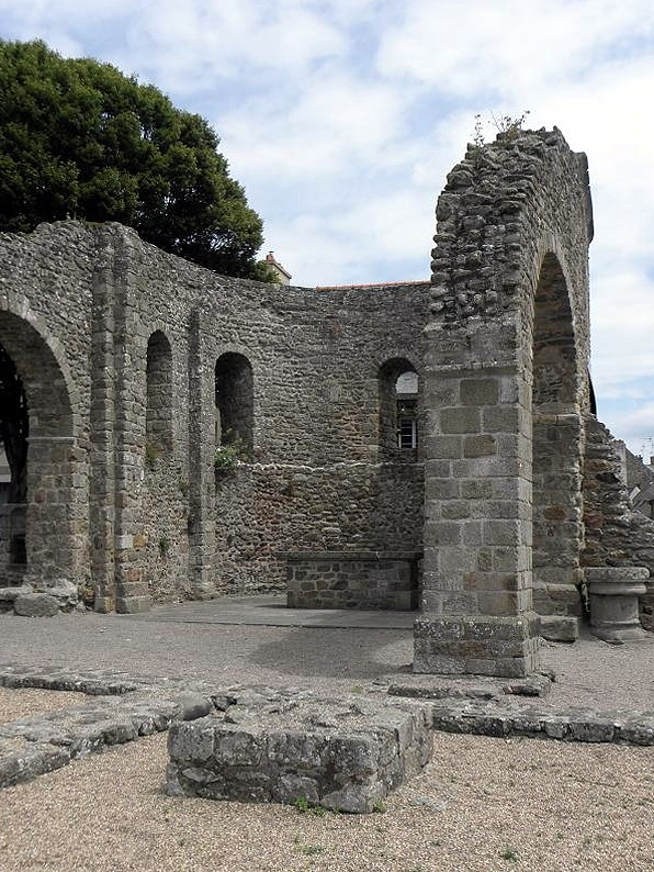 Cathédrale Saint-Pierre d'Aleth, Saint-Servan, commune de Saint-Malo (35).